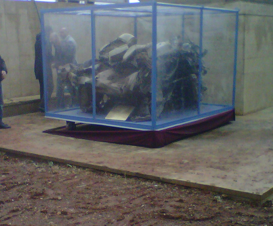 I resti dell'auto della scorta di Falcone, dopo la strage di Capaci, esposti nel 2012.